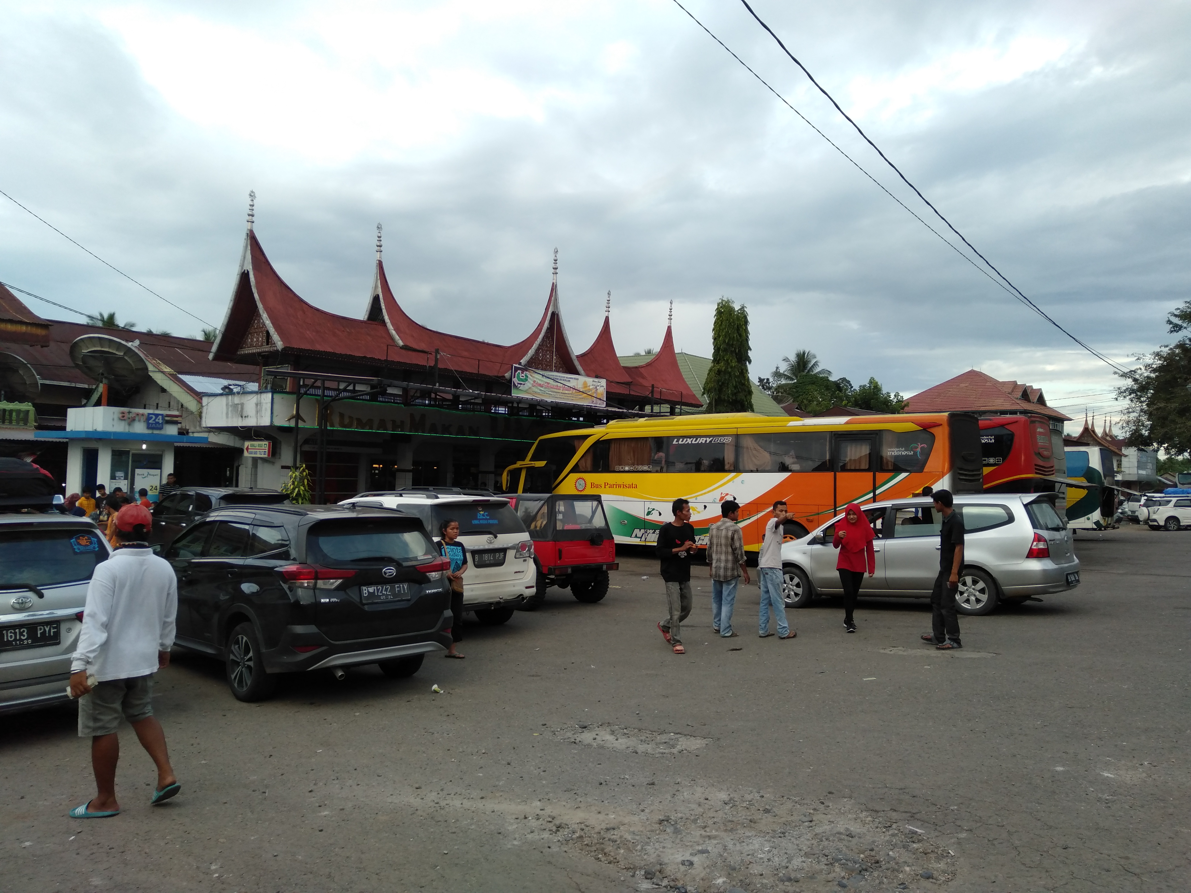 Rumah makan di Gunung Medan, Dharmasraya, Sumatra Barat, yang biasa dipakai sebagai tempat istirahat bagi para pemudik.